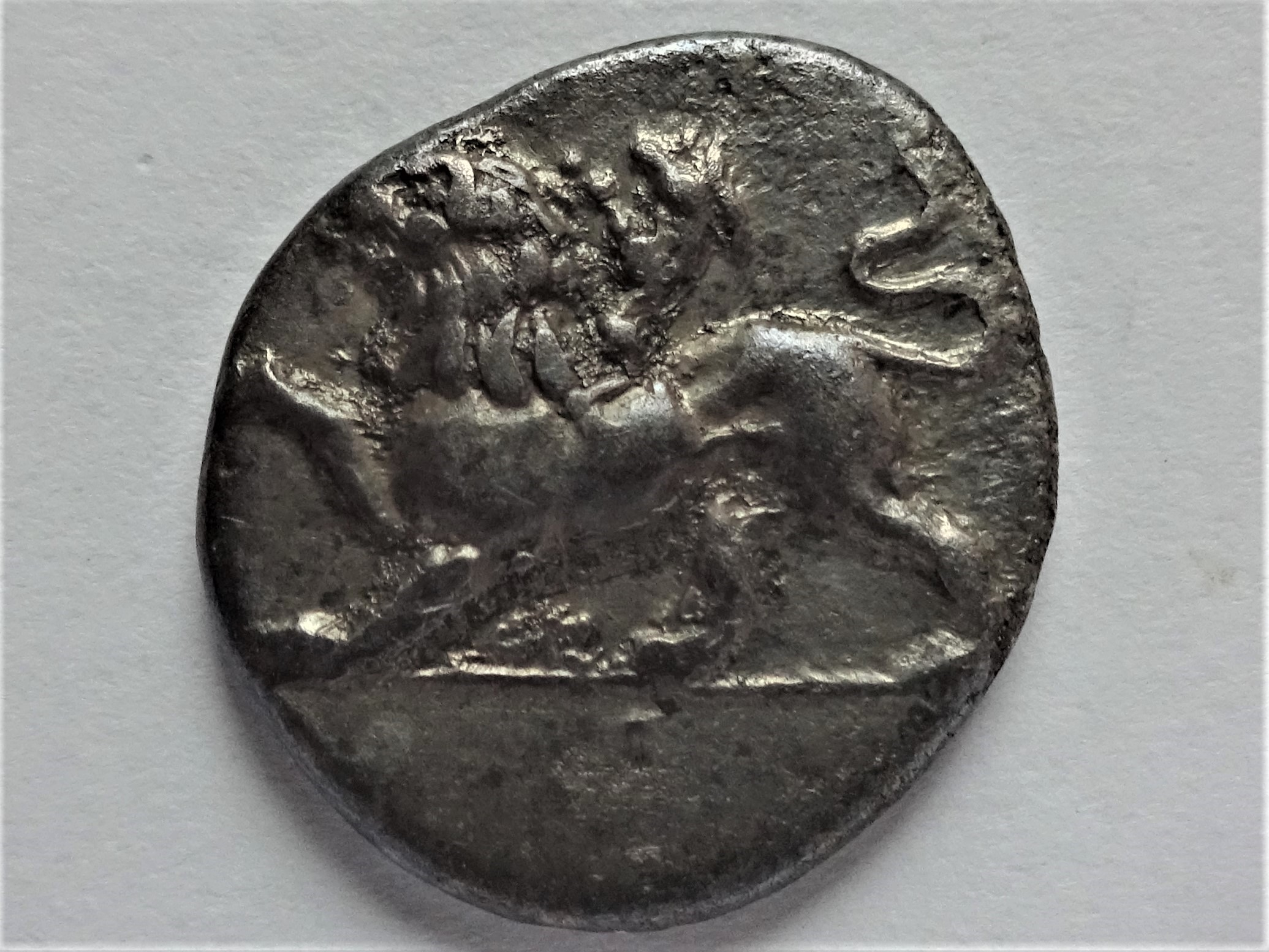 Hemidrachme aus Sikyon, Chimaira nach links stehend, ca. 360-330 v. Chr., Szaivert/Sear Nr. 2872 Av